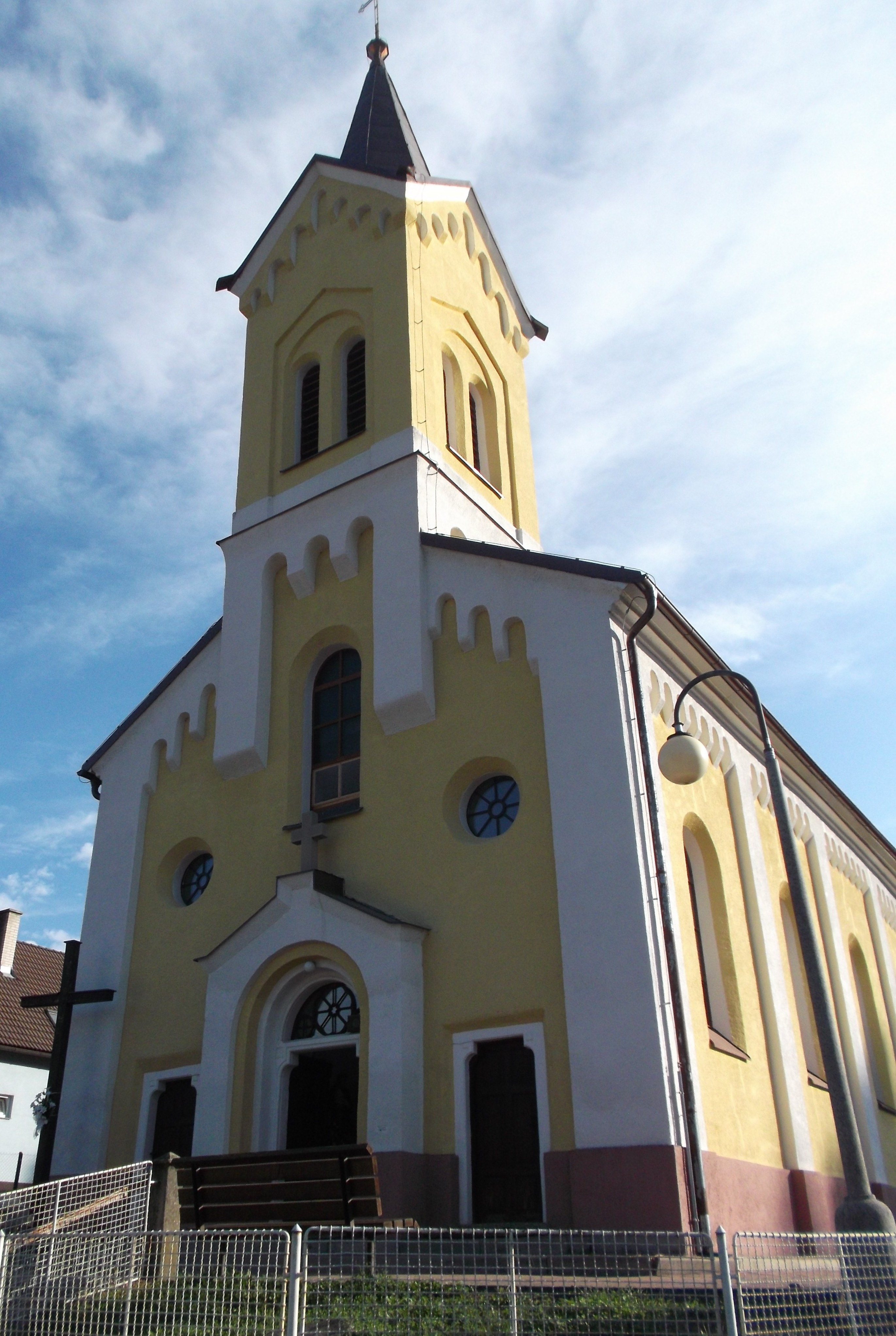 Kostol